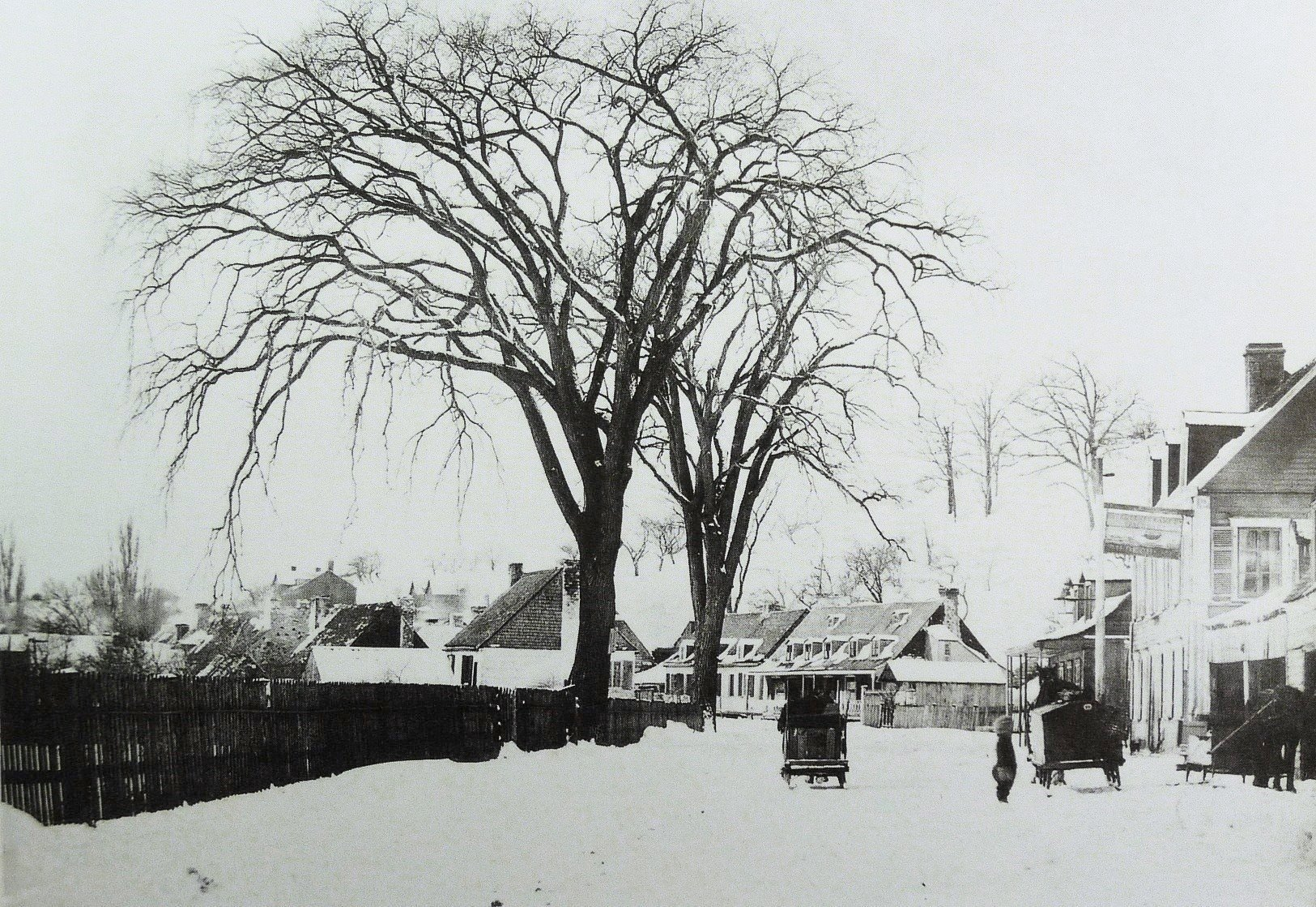 Scène d'hiver sur l'ancien chemin qui menait à Lachine au temps où Saint-Henri n'était qu'un village parmi d'autres.